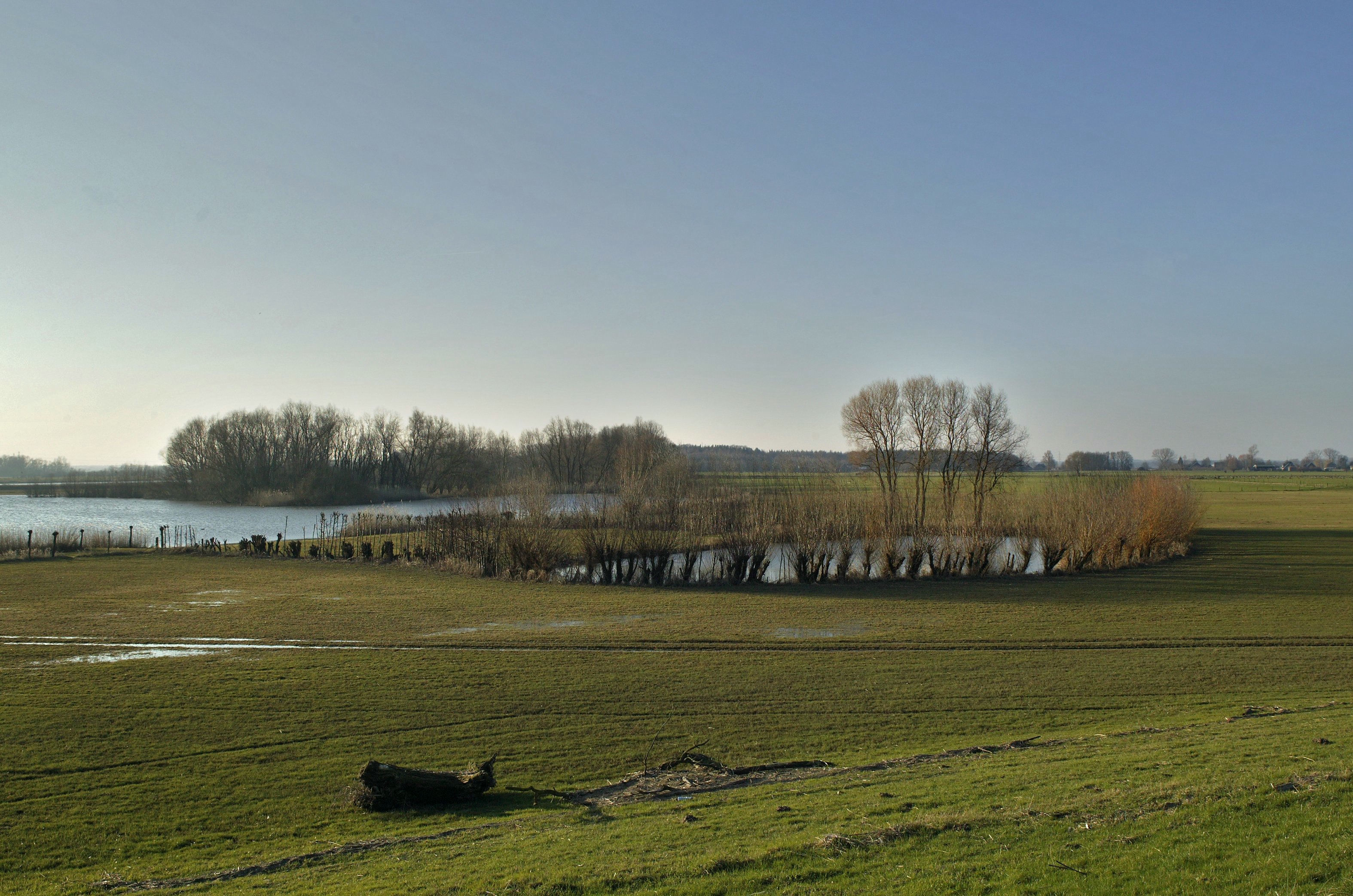 Cultuurlandschap: Zicht over de IJssel bij Olst